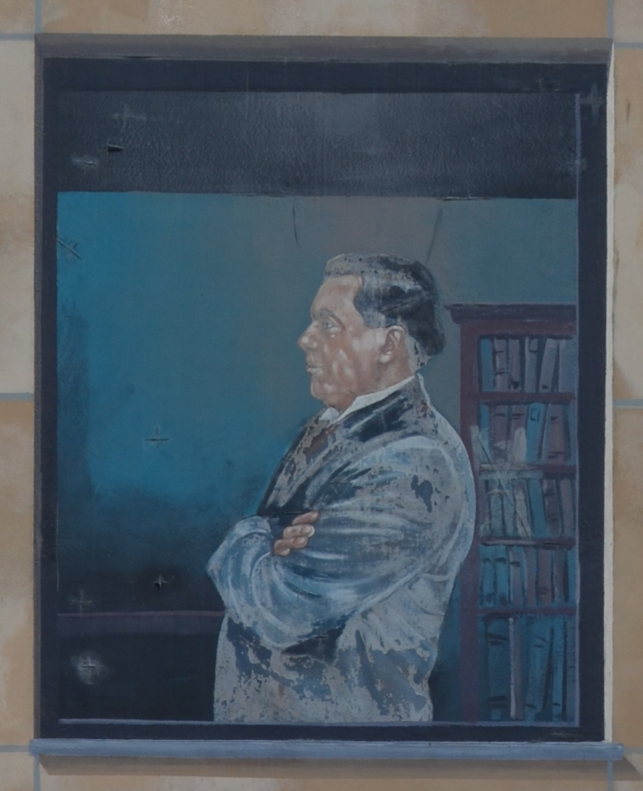 Namur - la fresque des Wallons dans les jardins du Mayeur - François Bovesse (détail)